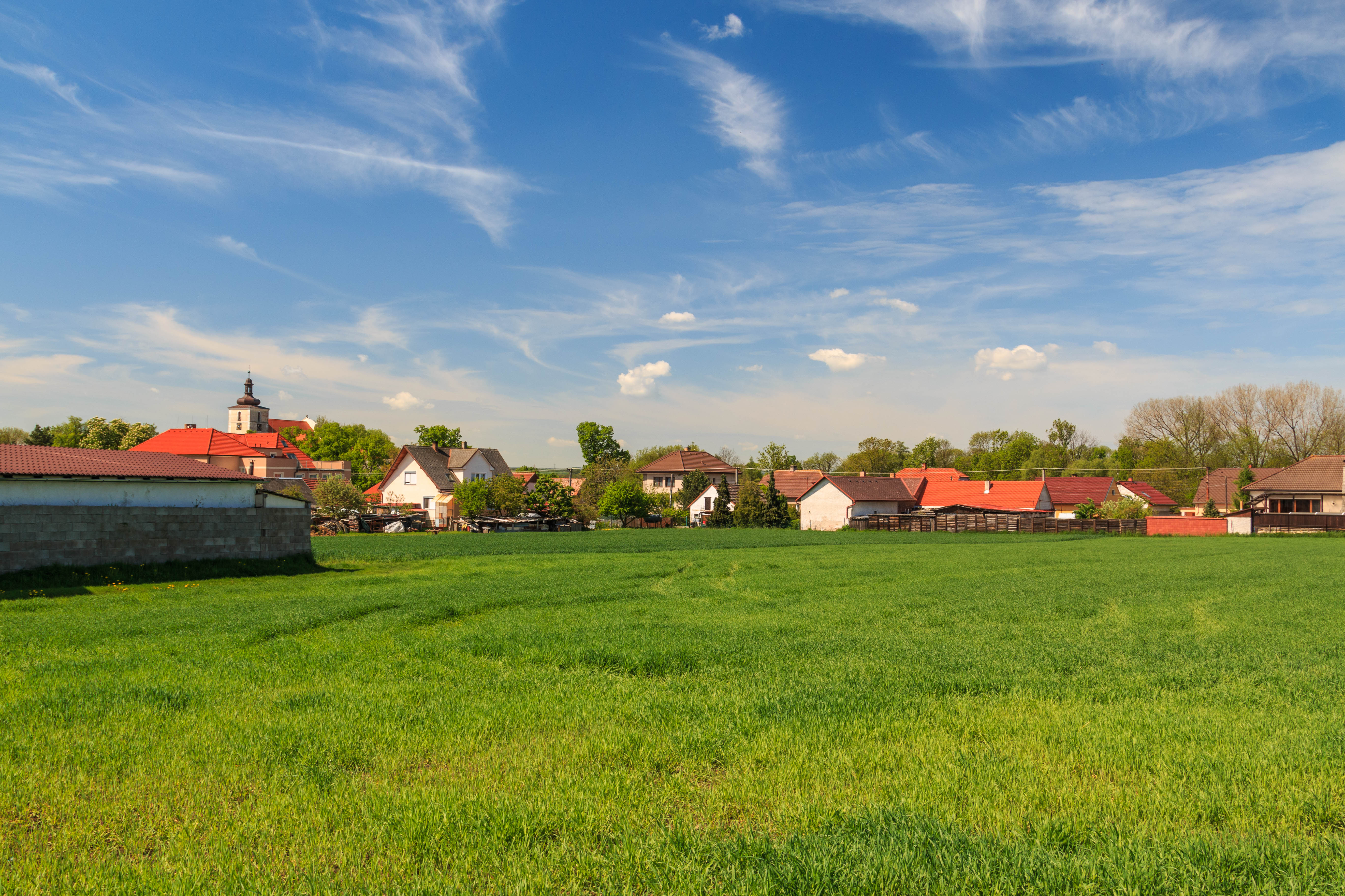 Církvice